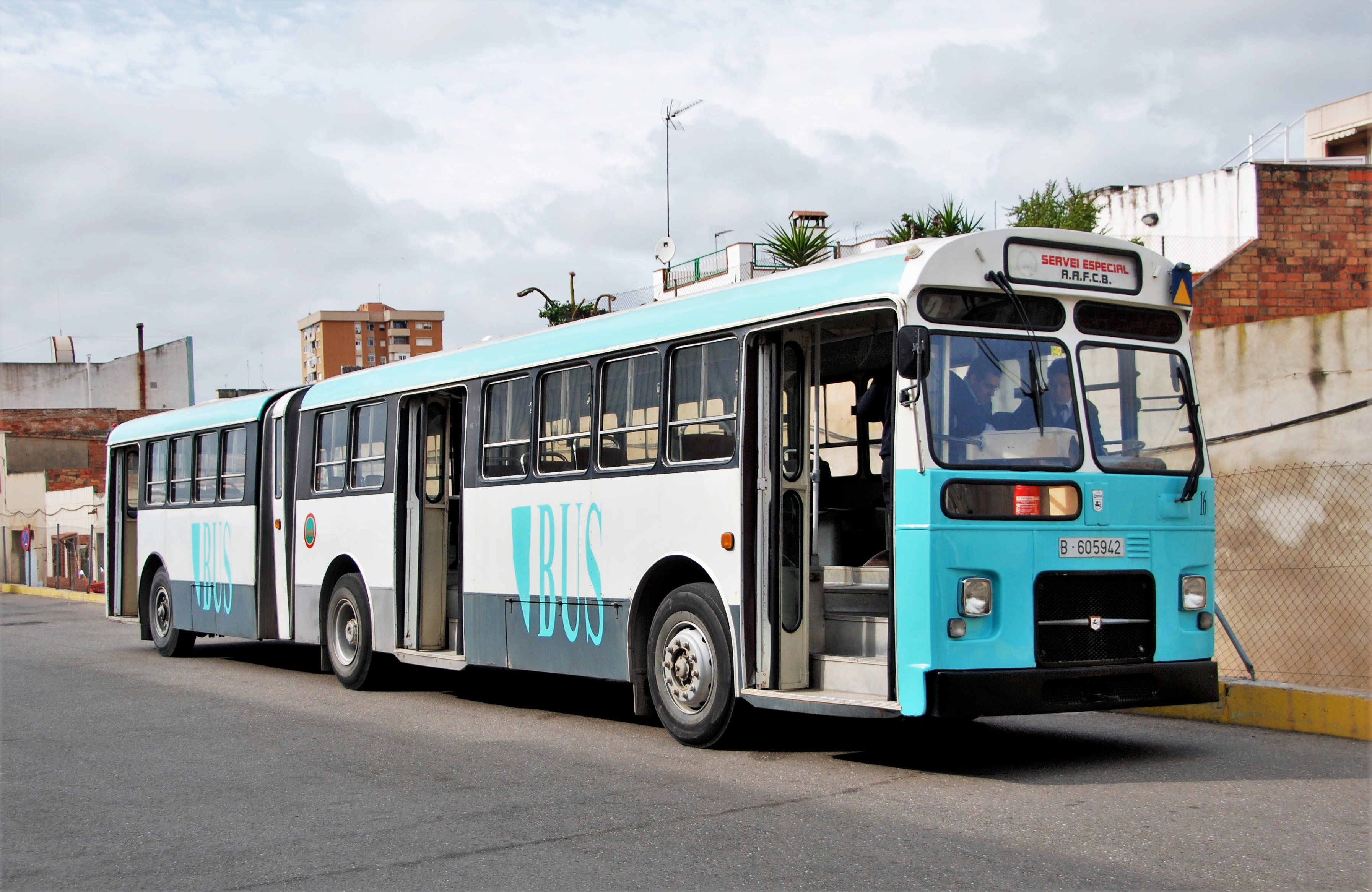 Autobús articulado número 16 de la UAB, un Pegaso 6035-A, que fue el 3031 de Transportes de Barcelona. En el momento de la foto era propiedad de la AAFCB.